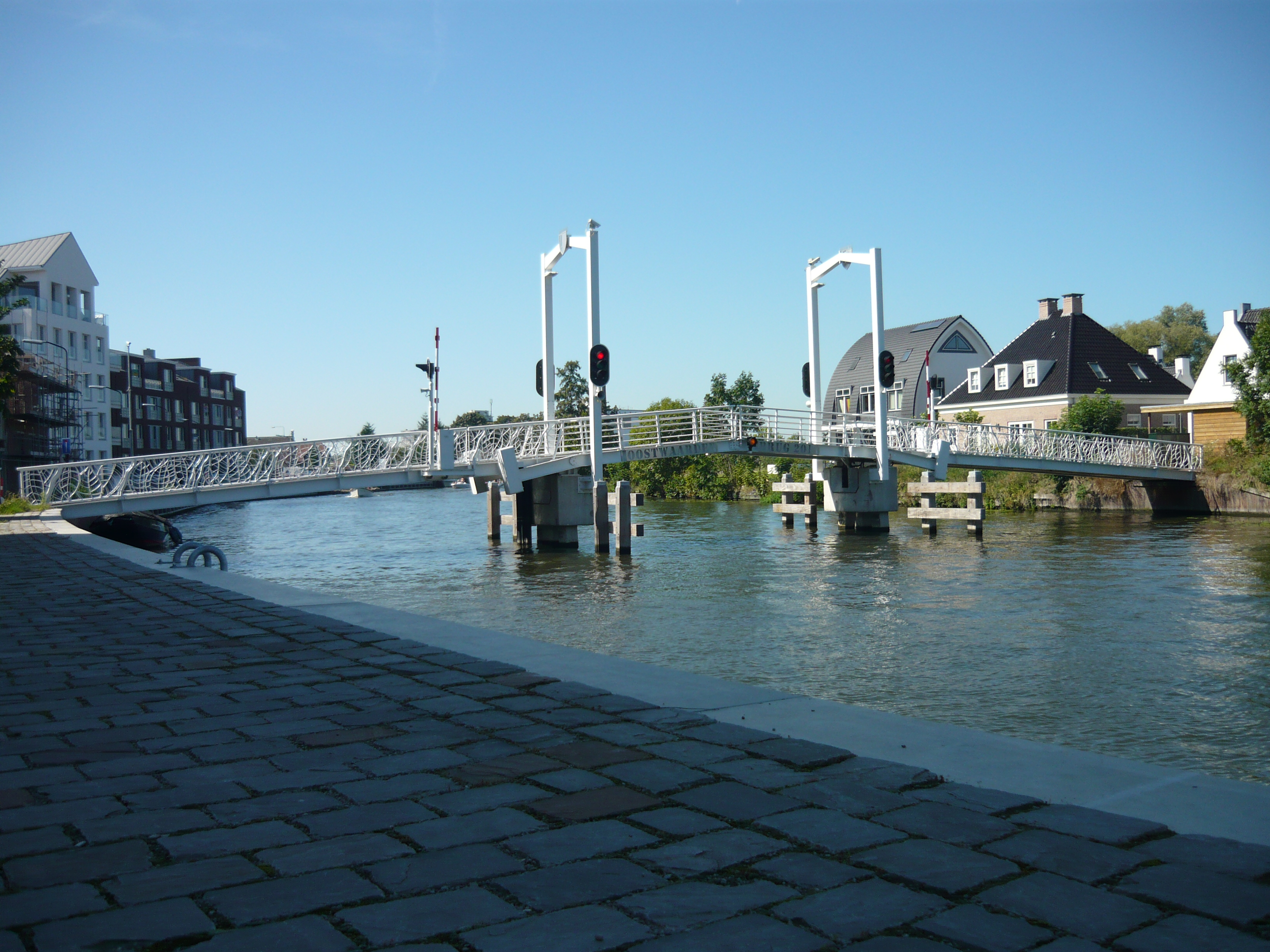 Oostwaarderbrug over de Vecht tussen Oud-Zuilen en Maarssen